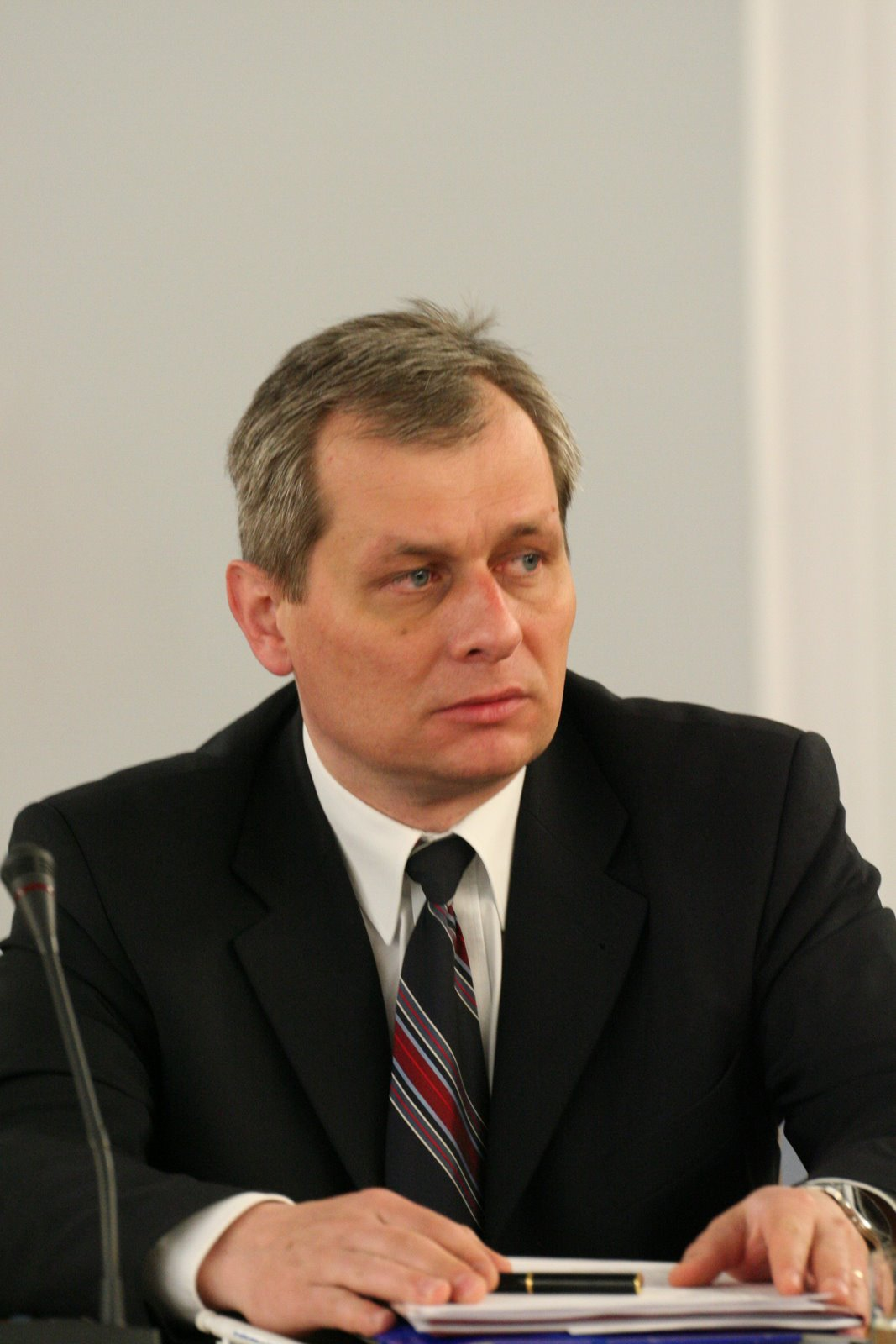 Sławomir Kłosowski, nauczyciel i polityk.